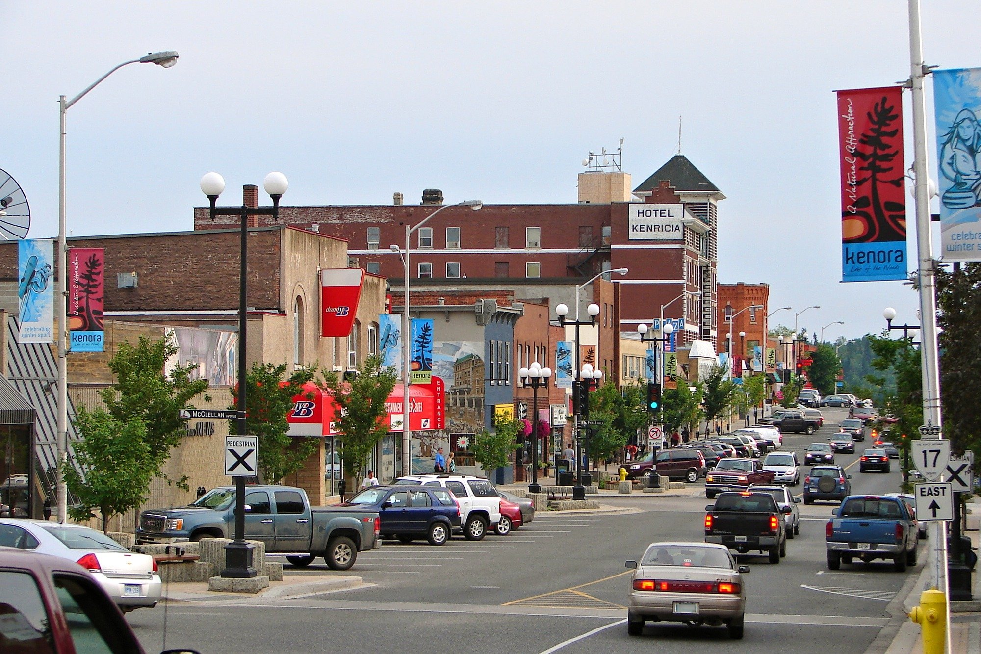 Kenora, Ontario, Canada